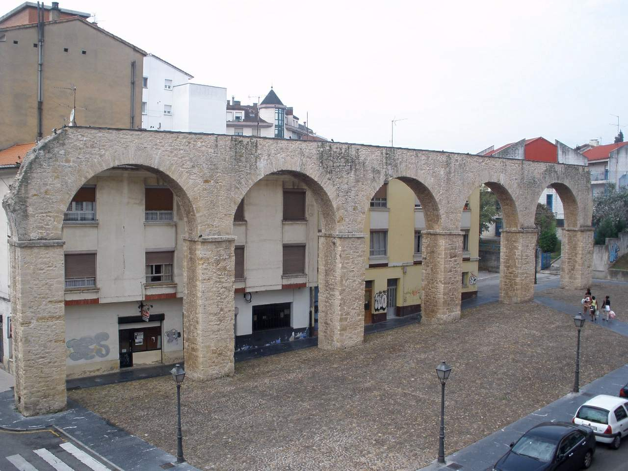 Oviedo - Acueducto de los Pilares